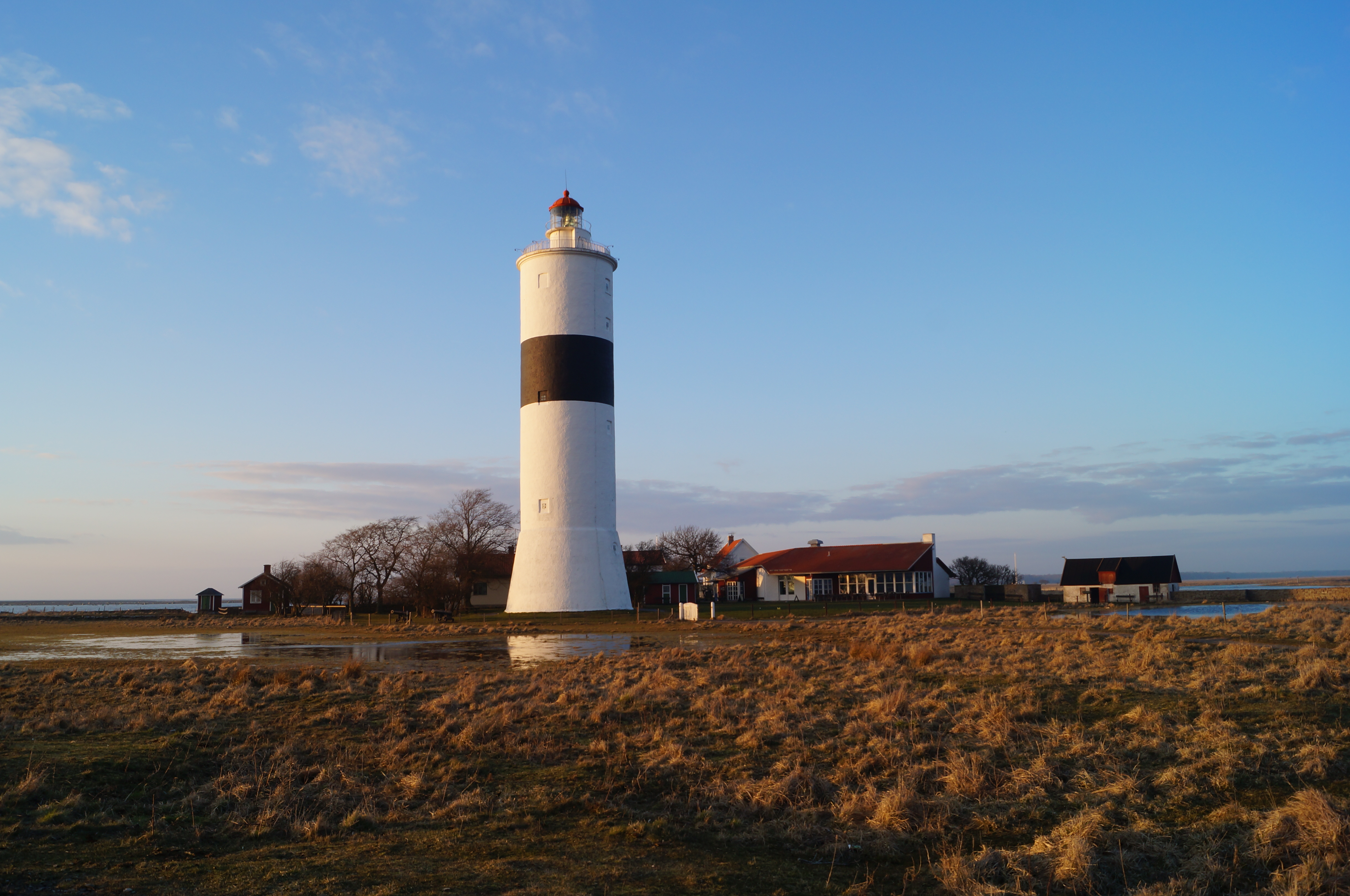 Långe Jan (Ottenby 1:2 (f.d. Skogsgärdsängen 1:1))